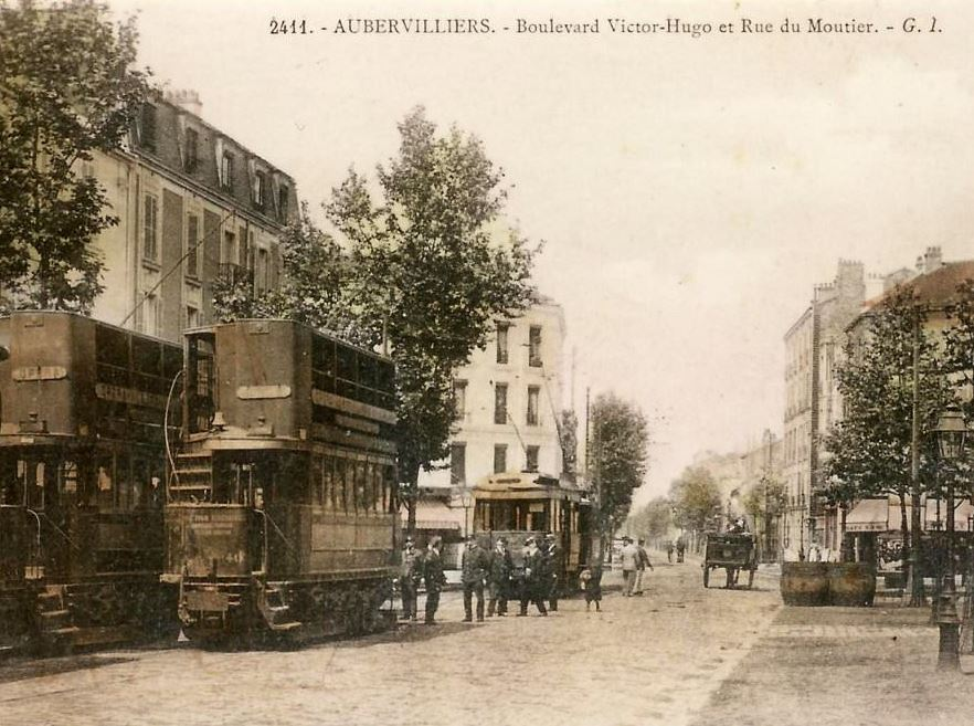 Aubervilliers, boulevard Victor-Hugo, rue du Moutier, vers 1900. Tramways de Paris, ligne Opéra-Aubervilliers.